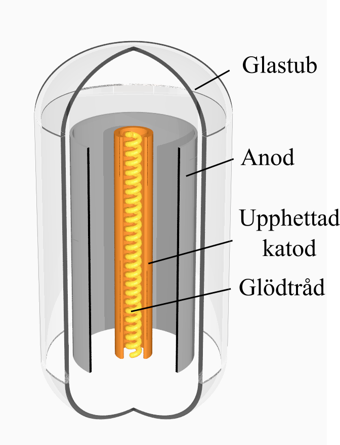 RörDiod